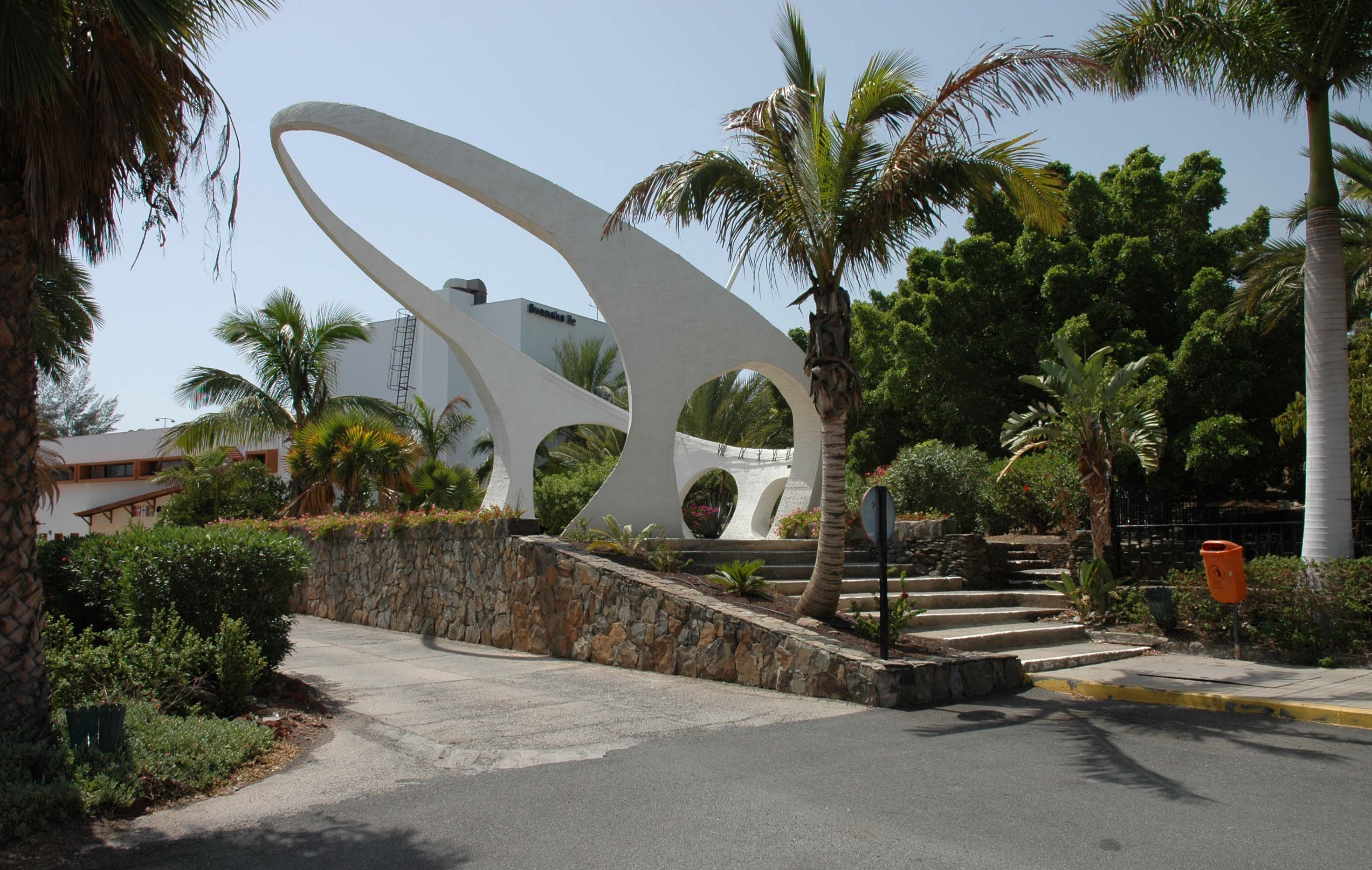 Sundial in San Agustin, Gran Canaria.